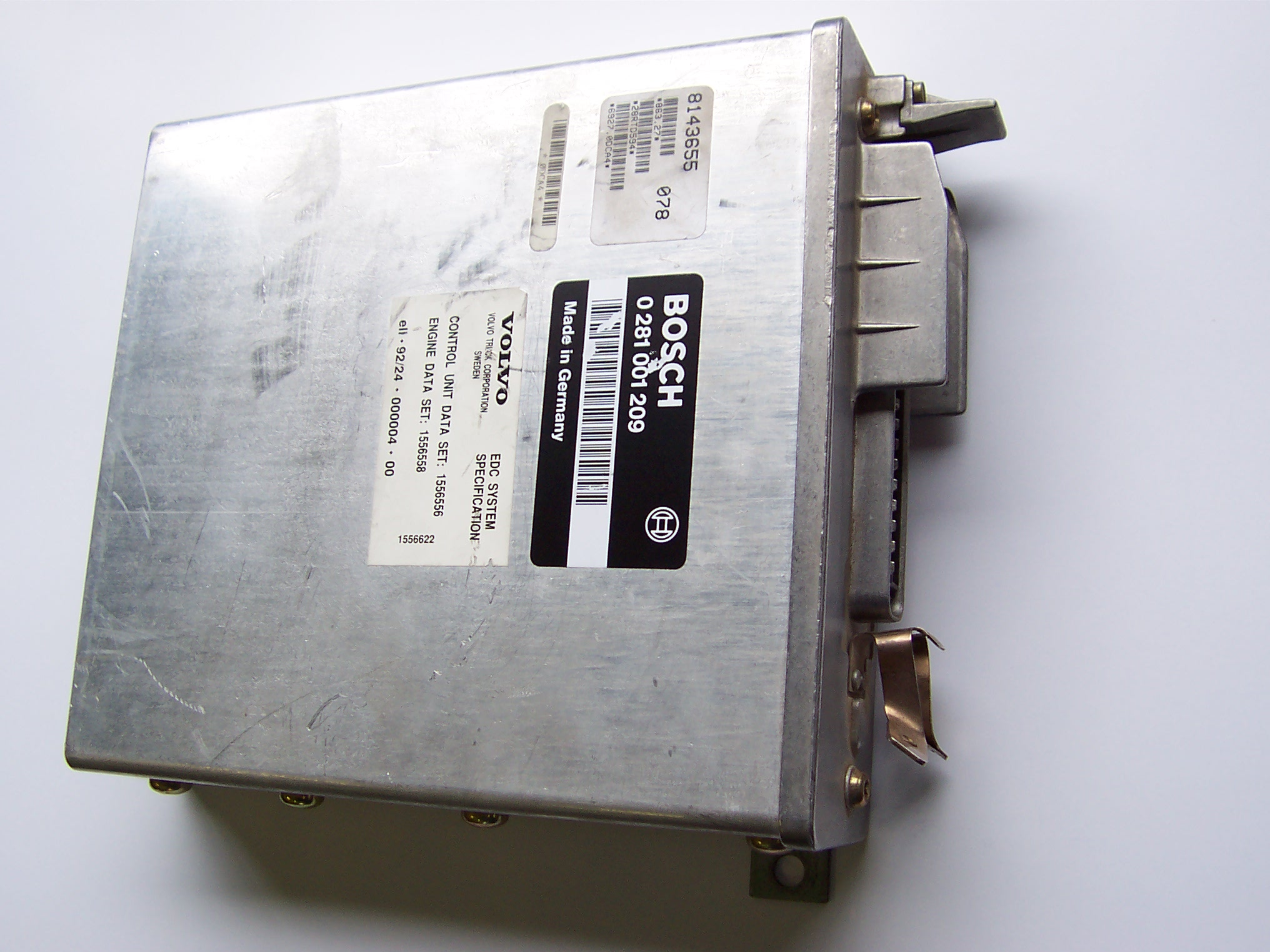 EDC control unit Media:Diesel Engines